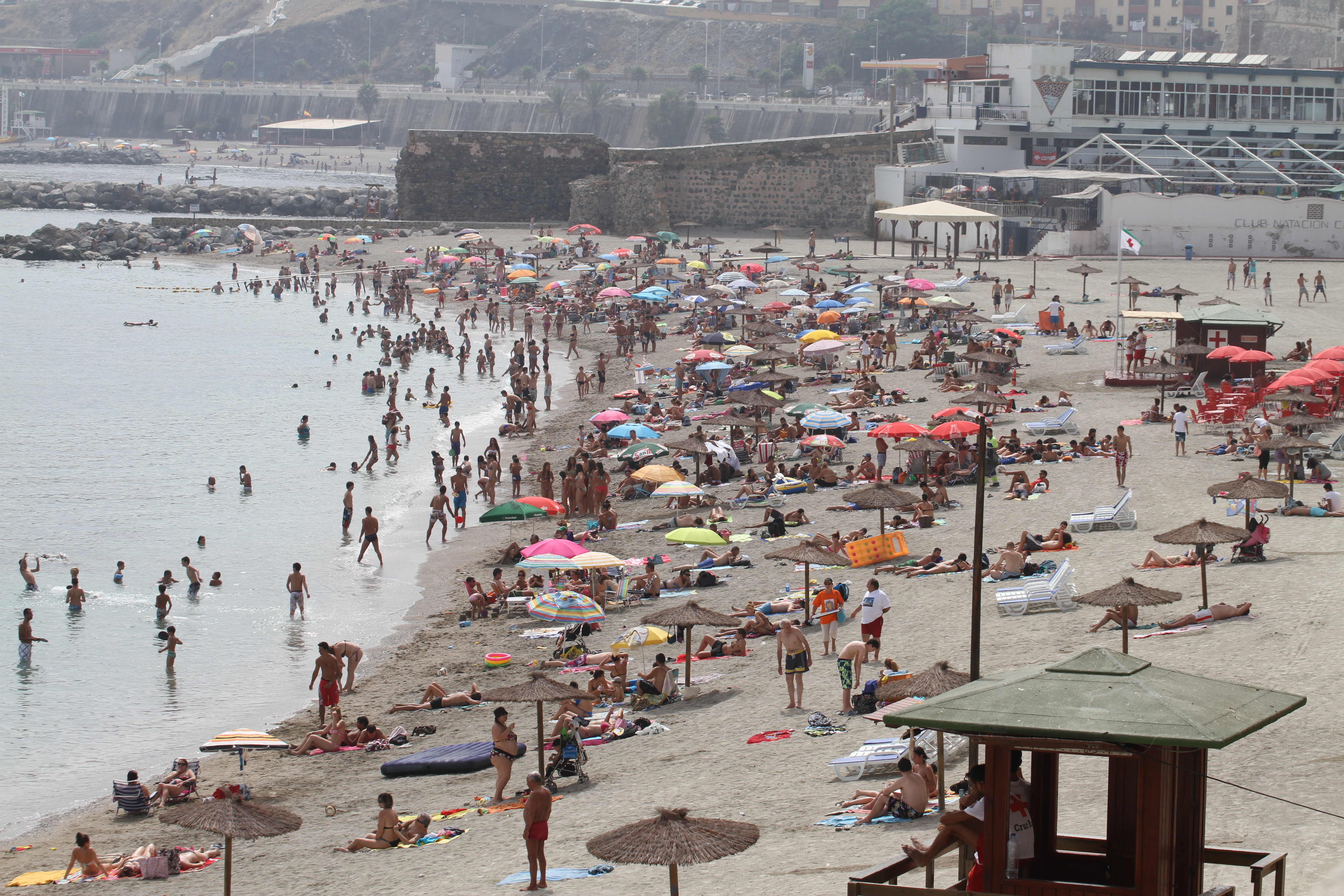 Paseo De Las Palmeras, Ceuta, España